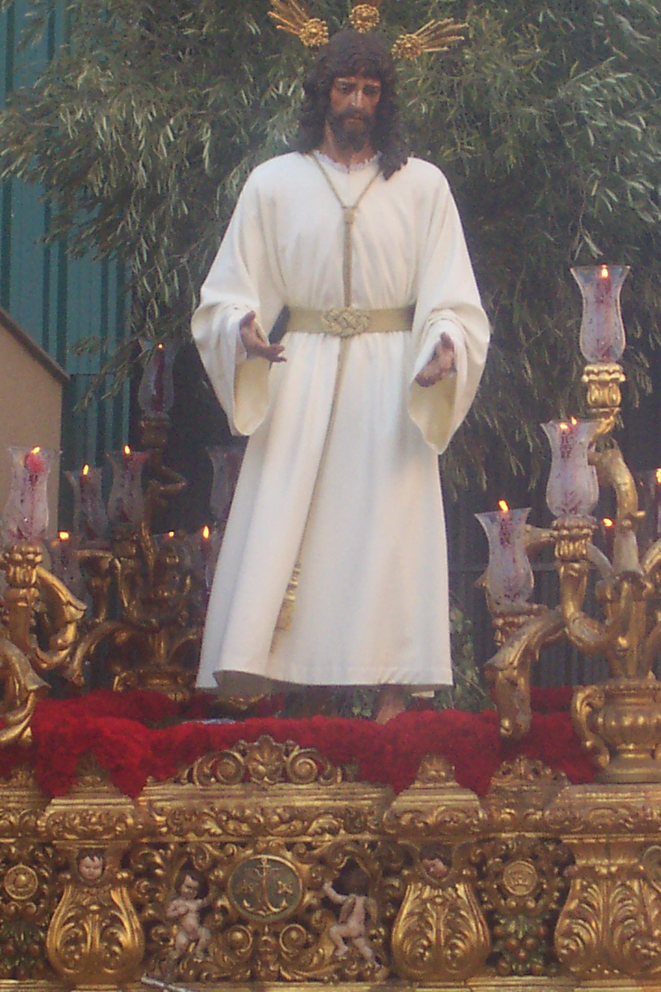 Nuestro Padre Jesús de la Humildad